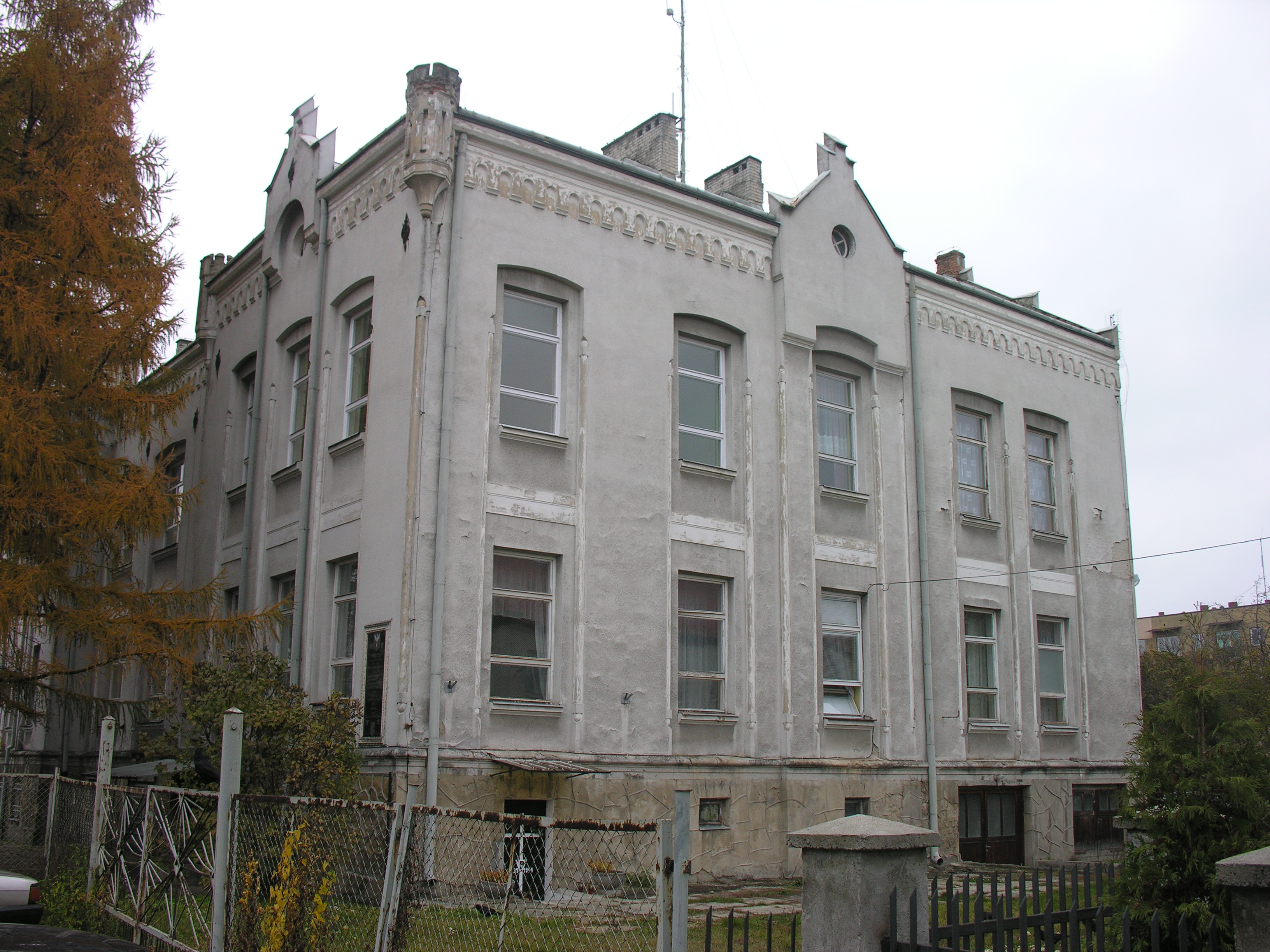 Siedziba gestapo w Jaśle (obecnie szpital), ul. Za Bursą 1